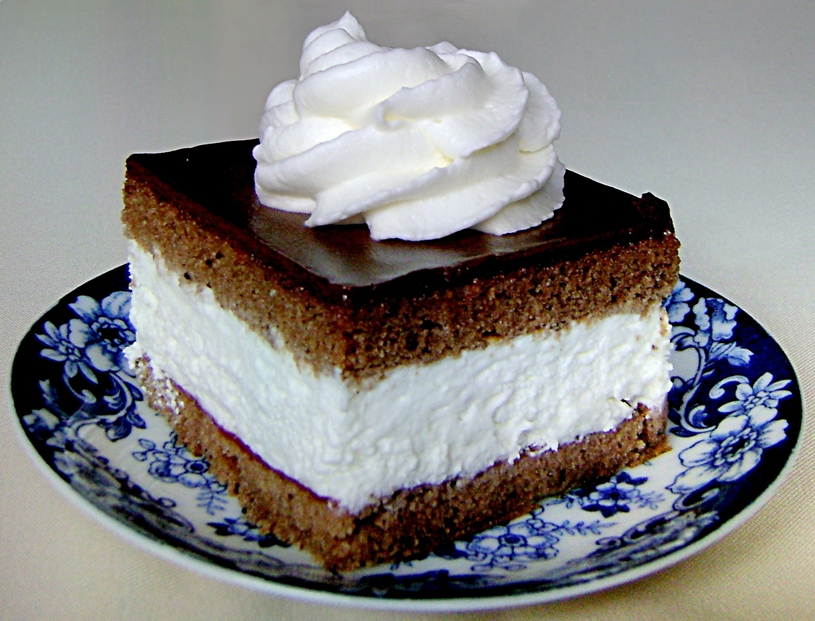 Wuzetka. Praca pochodna do zdjęcia Wuzetka.JPG. Plik poddany znacznej obróbce w programie GIMP, zastosowano m.in. zmianę kontrastu przy użyciu metody Retinex.